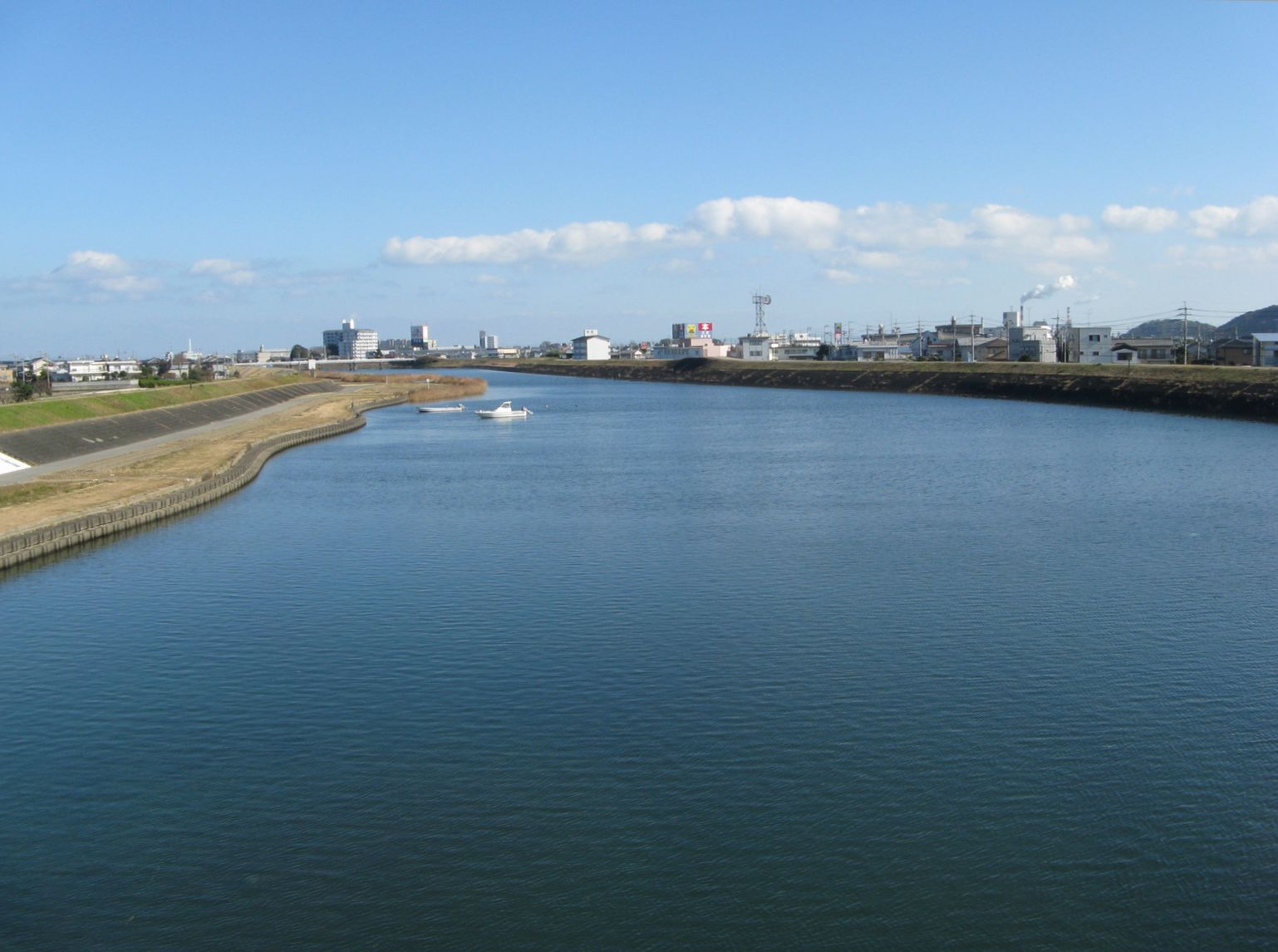 桑野川 牟岐線阿波中島駅～阿南駅間から東望